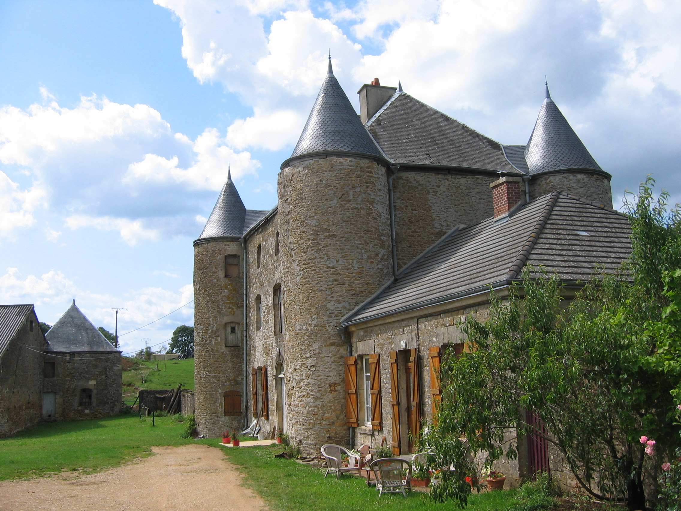 Vue Sud-Est du château de Villers à Maisoncelle-et-Villers, en Ardennes (France)